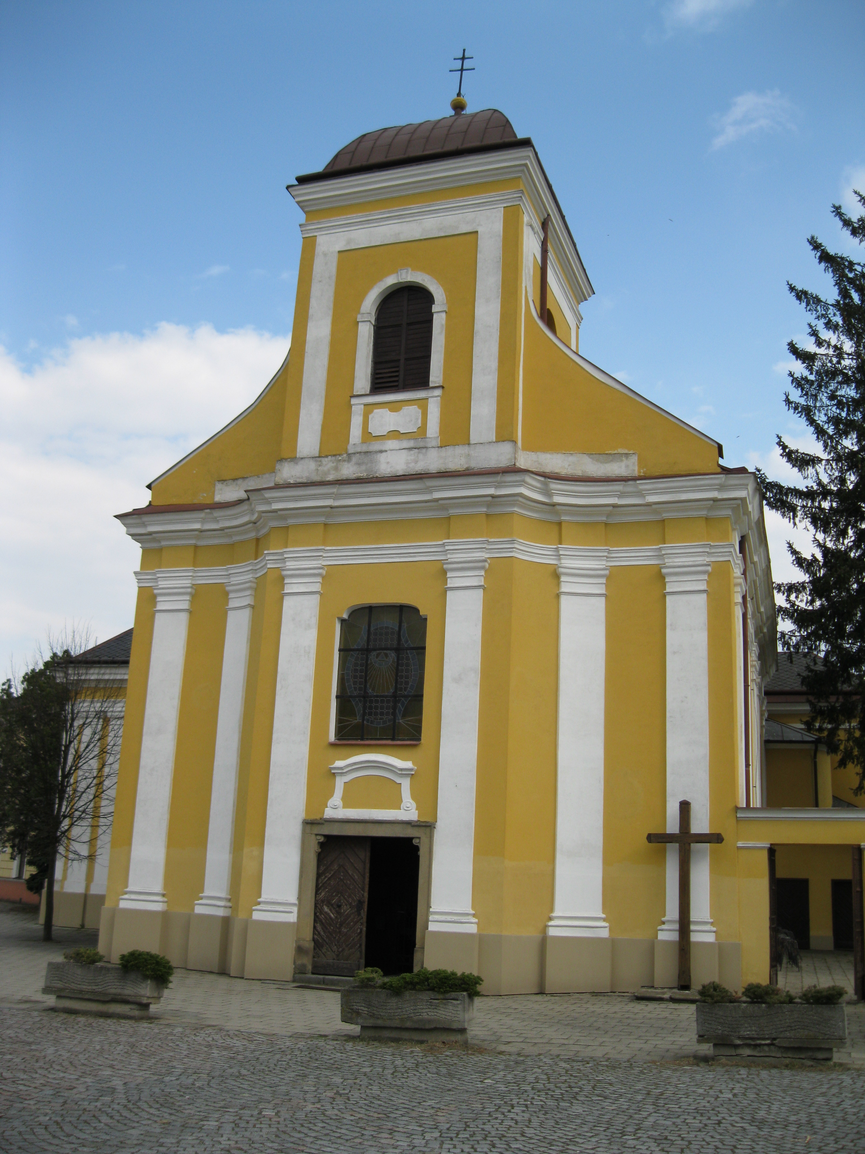 Kostel sv. Jiljí (Chropyně), nám. Svobody, Chropyně